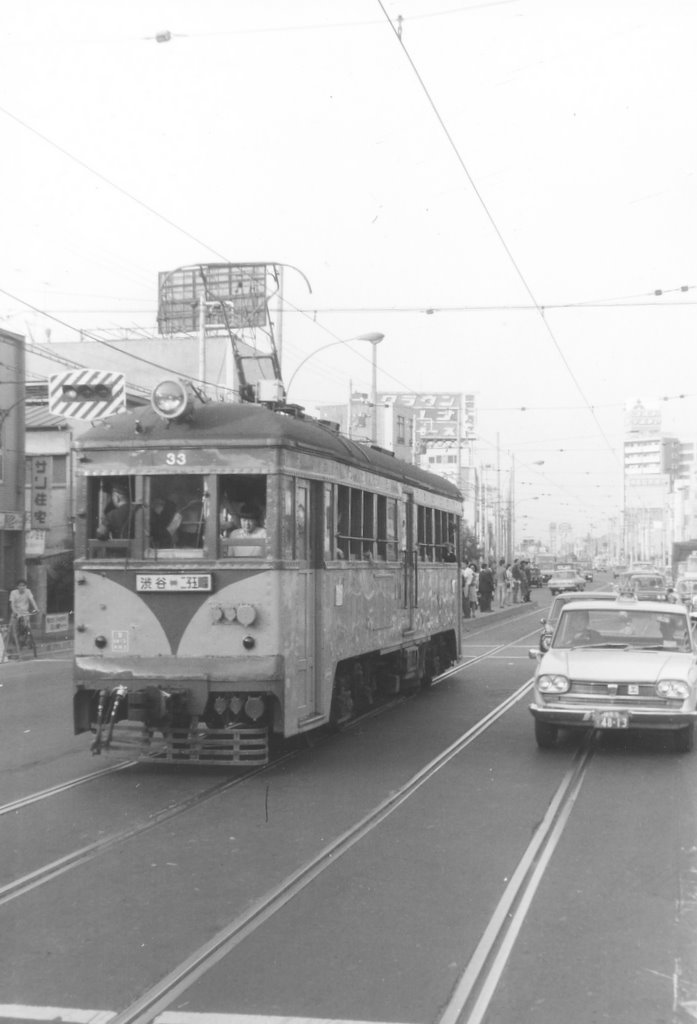 東急デハ30形33（真中駅）